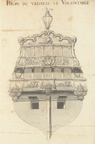 Dessin de Jean Bérain représentant les décorations de la poupe du Volontaire, vaisseau de 4ème rang de 44 canons lancé en 1695 à Toulon.